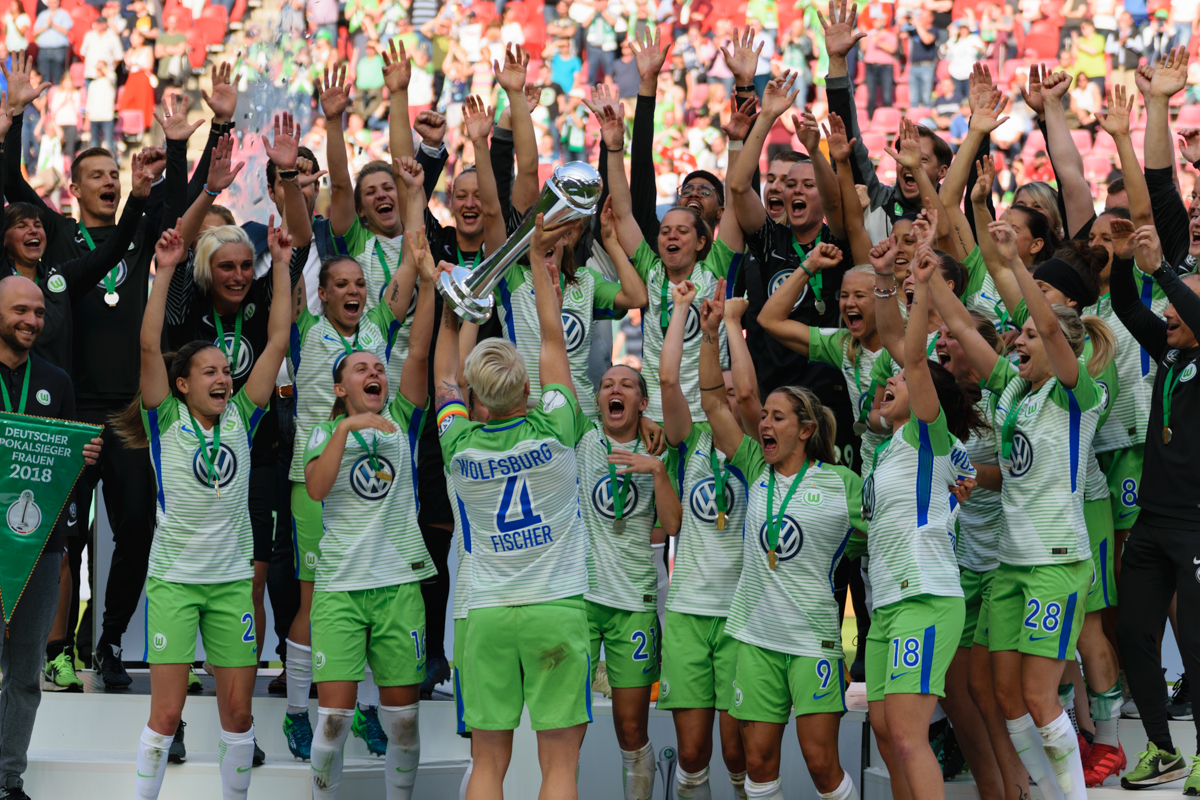 Nila Fischer vom VfL Wolfsburg stemmt den Pokal in die Luft